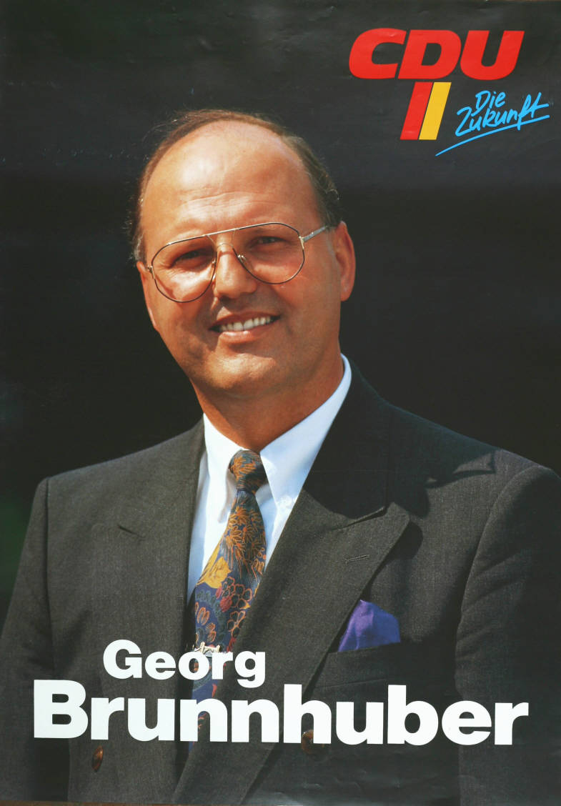 CDU Die Zukunft Georg BrunnhuberAbbildung:PorträtfotoPlakatart:Kandidaten-/Personenplakat mit PorträtObjekt-Signatur:10-001: 3515Bestand:Plakate zu Bundestagswahlen (10-001)GliederungBestand10-18:Plakate zu Bundestagswahlen (10-001) » Die 12. Bundestagswahl am 2. Dezember 1990 » CDU » Mit PorträtfotoLizenz:KAS/ACDP 10-001: 3515 CC-BY-SA 3.0 DE